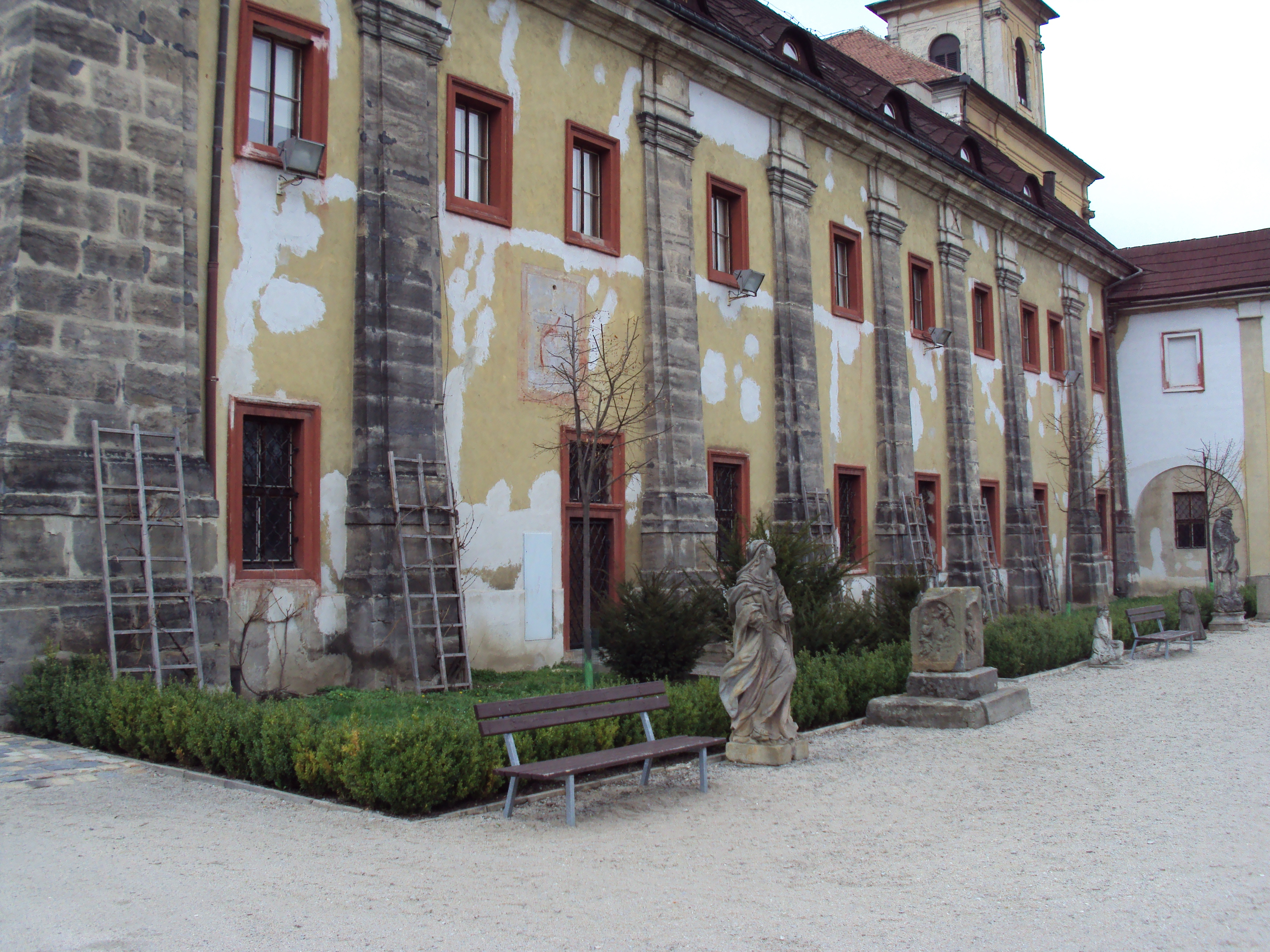 Areál kláštera, strana od zahrad, patří muzeu